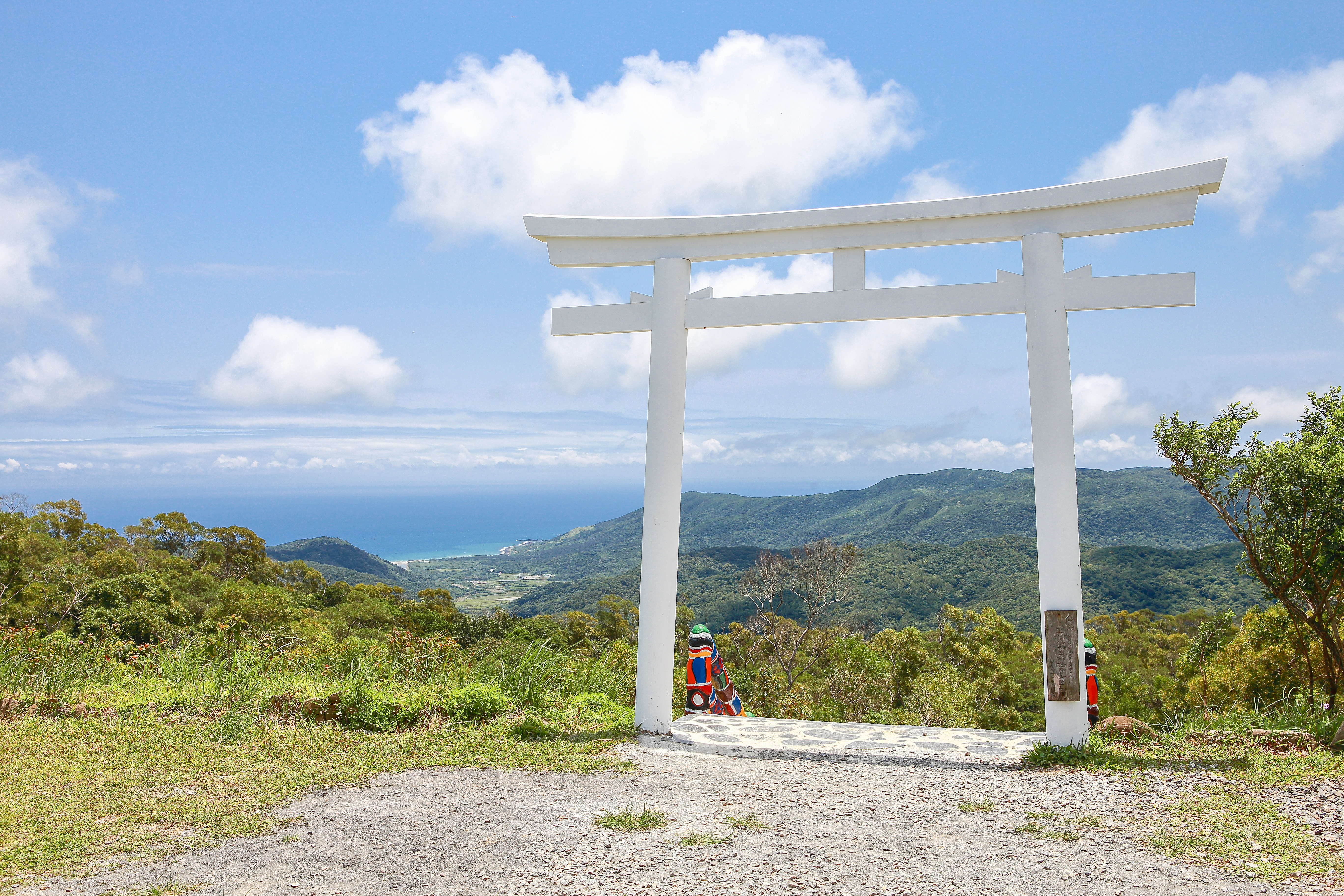 中文（台灣）: 牡丹鄉高士神社